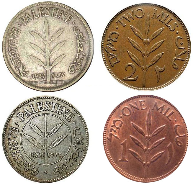 גב מטבעות מתקופת המנדט